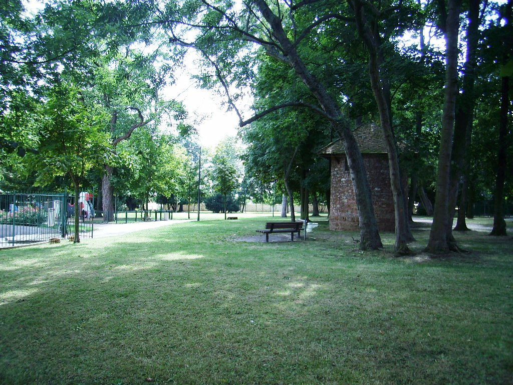 Parc du centre-ville de Saulx-les-Chartreux (91)